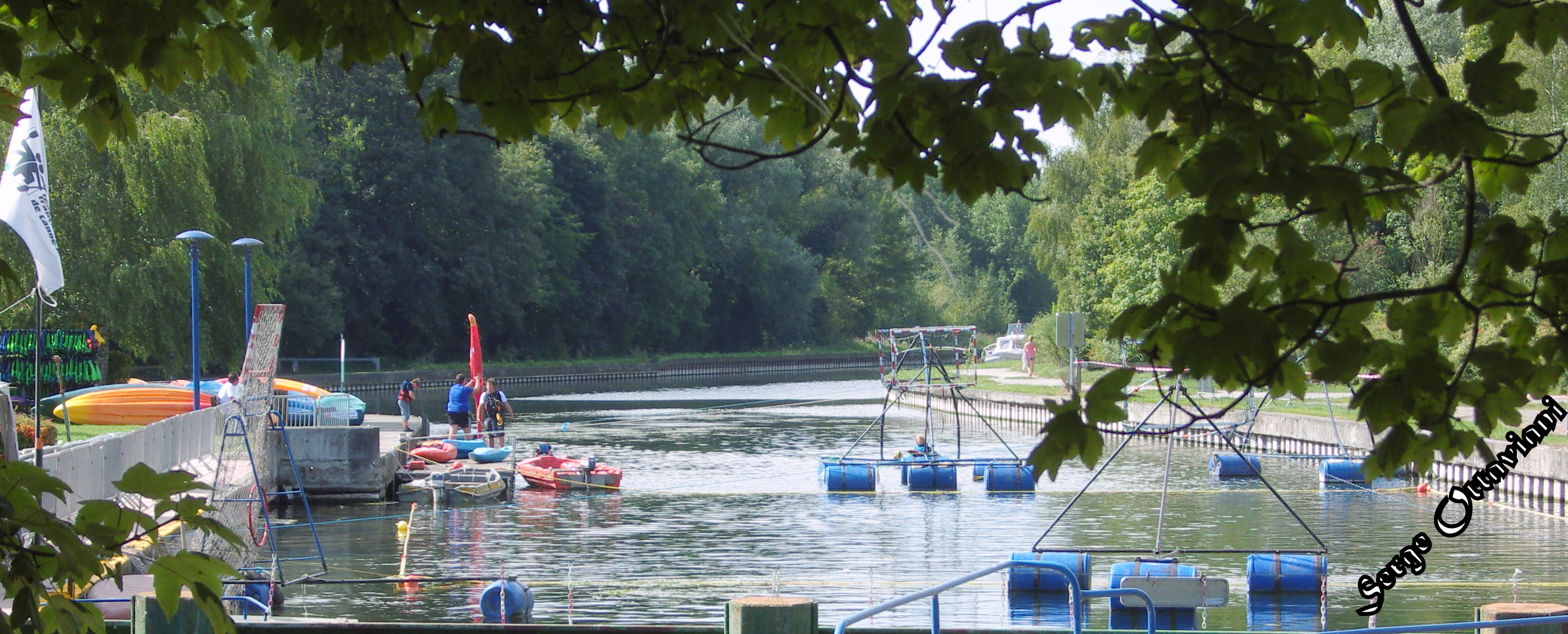 Biache-Saint-Vaast la base nautique